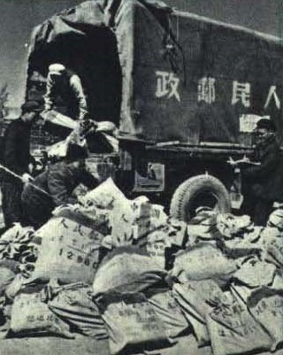 1963-04 1963年 中国人民邮政